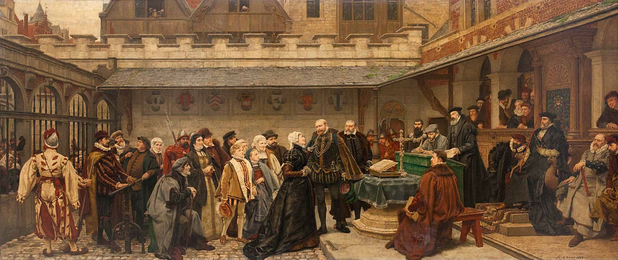 Verzoening voor de rechtbank